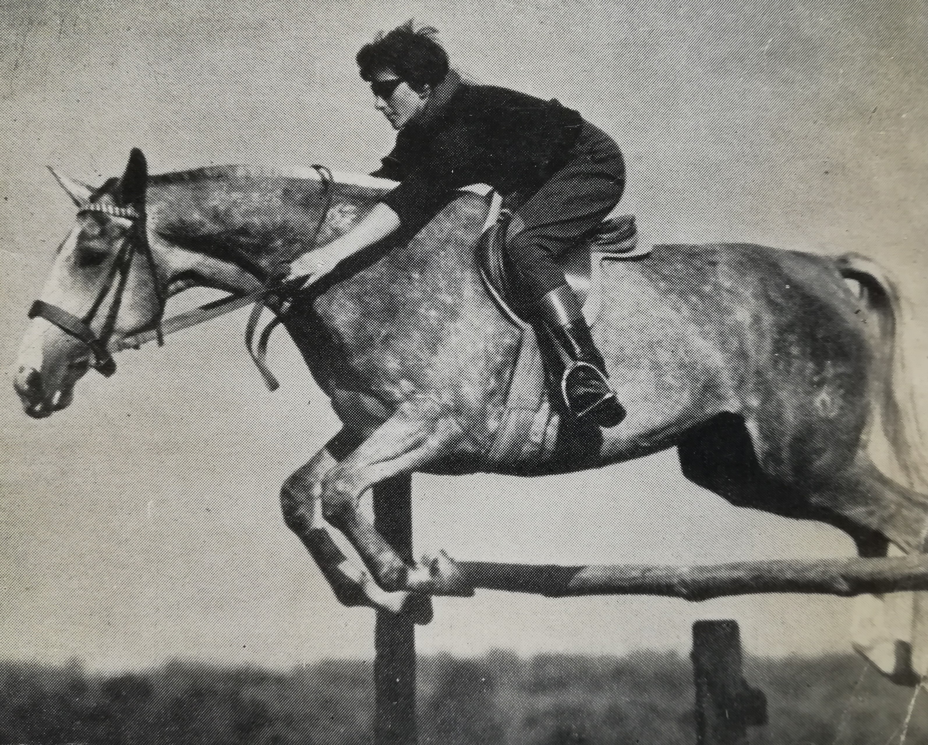 Konie na poznańskiej Woli w 1967 r.